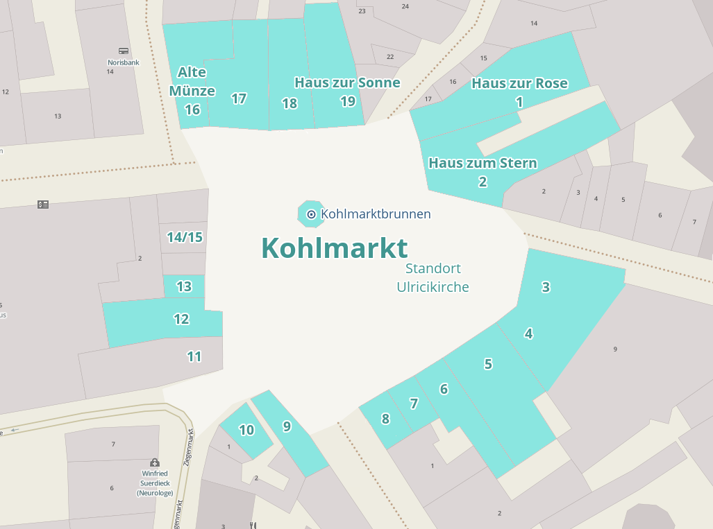 Plan des Baudenkmals Kohlmarkt in Braunschweig mit seinen Bauwerken. Die Kulturdenkmale am Kohlmarkt sind im hellen Türkis eingezeichnet. Der Umriss der Ulricikirche ist ebenfalls ein Kulturdenkmal.